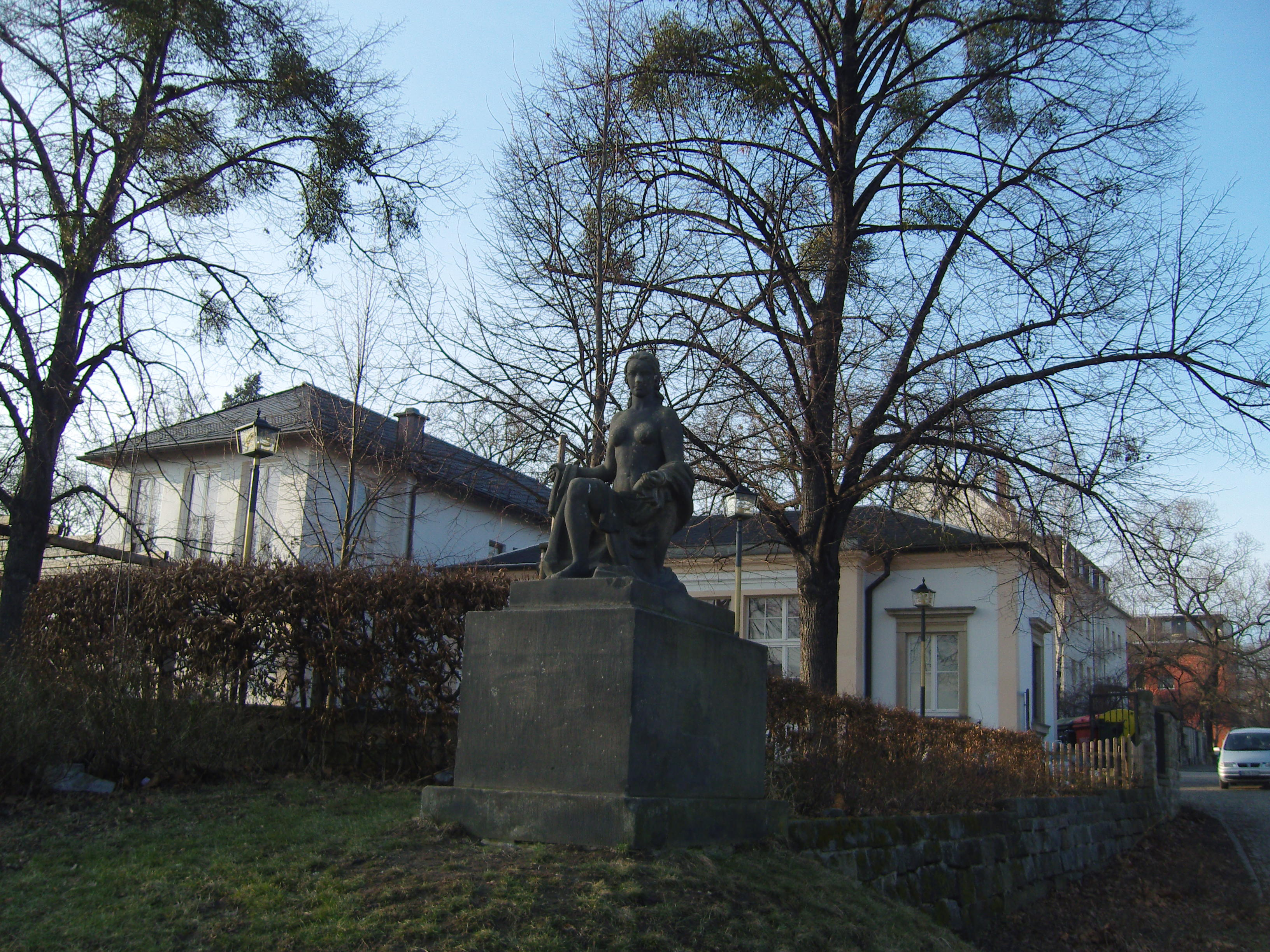 Plastik Große Knieende im Rosengarten in Dresden